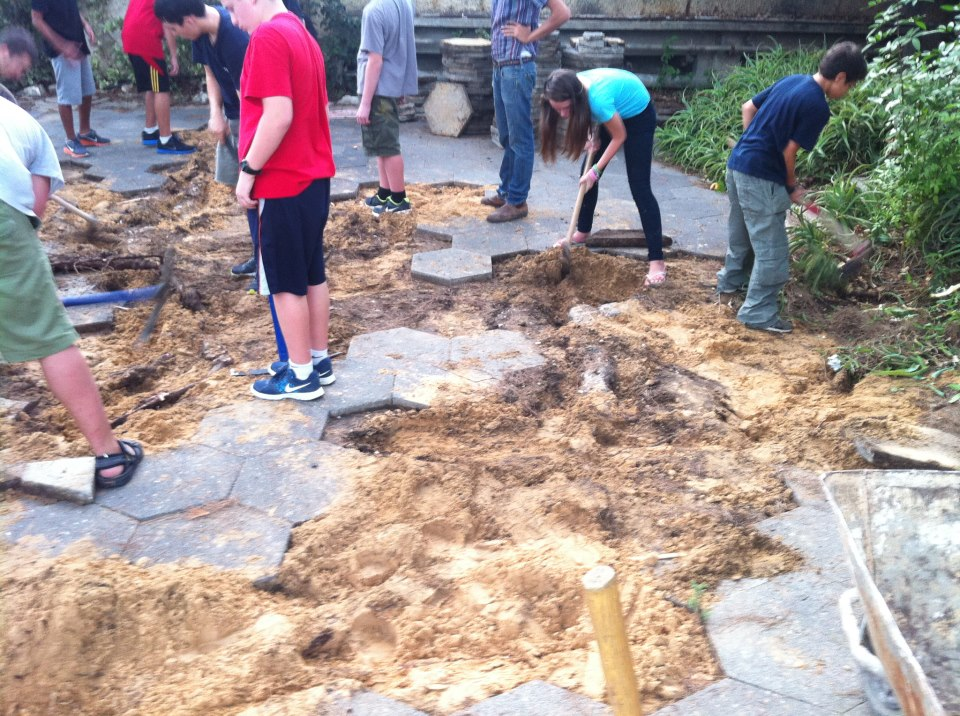 חניכי ענף פרויקטים משפצים את הרחבה שמחוץ לחדר האוכל